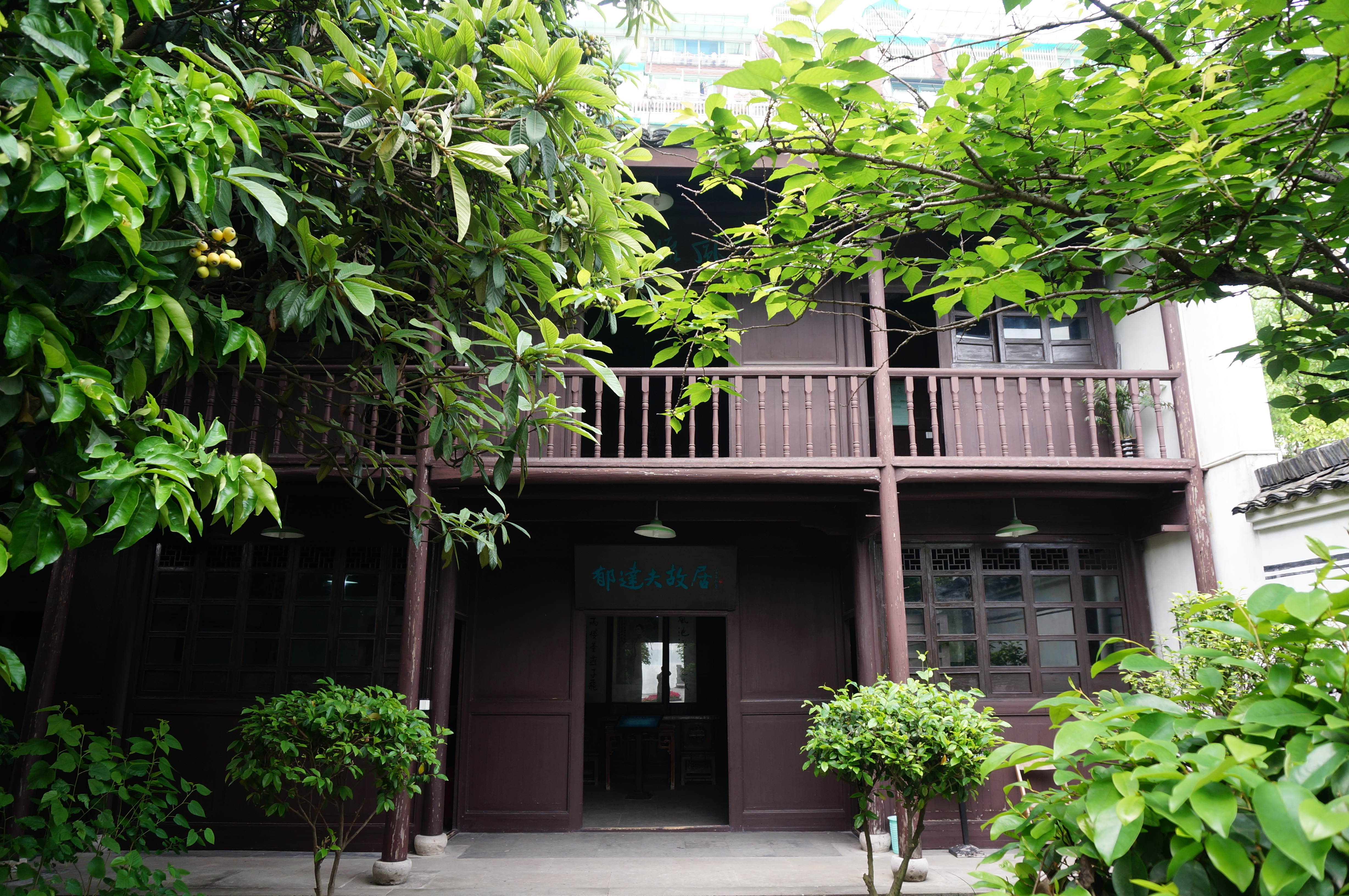 富阳郁达夫故居，主楼南侧。